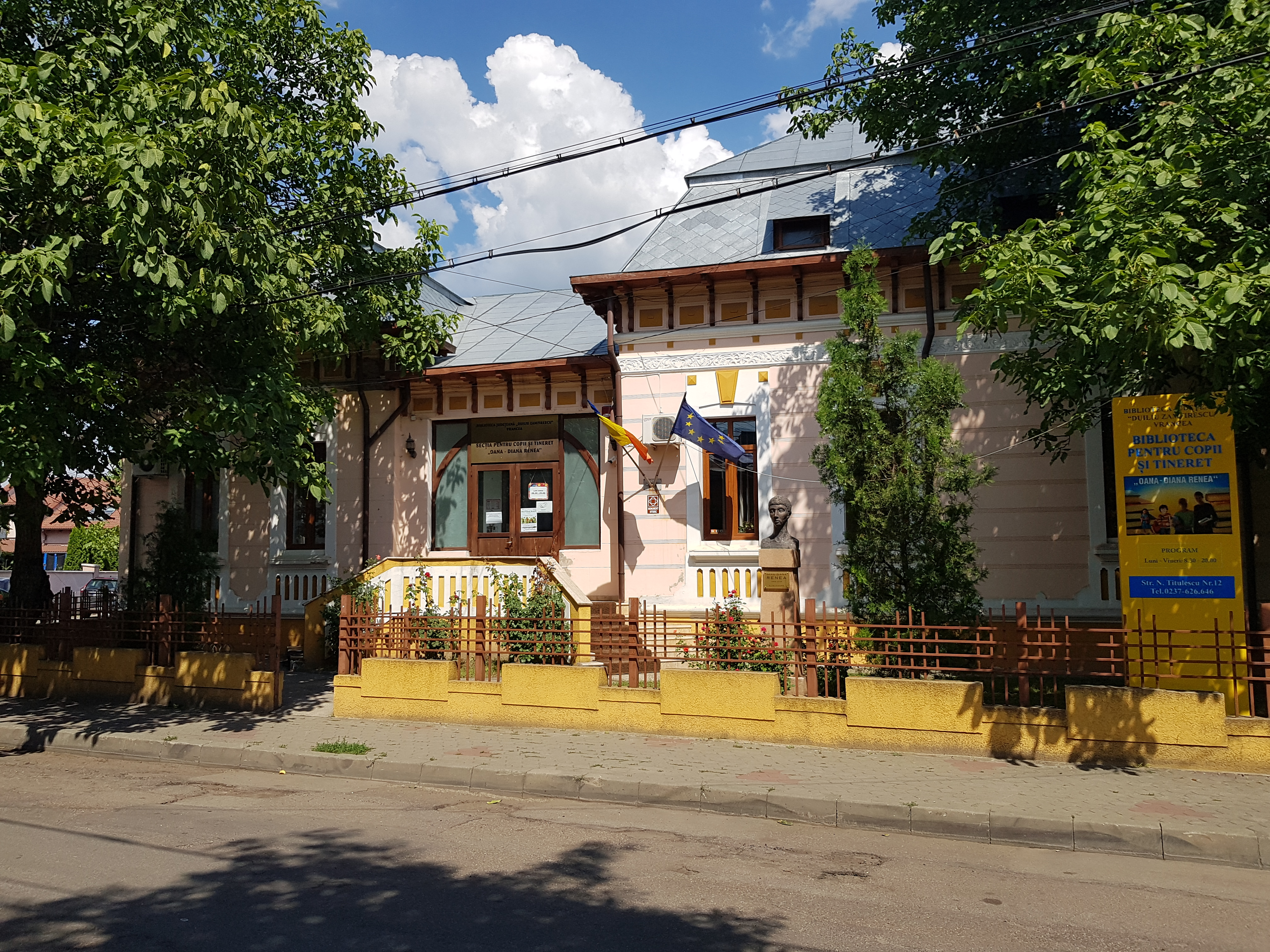 Biblioteca pentru copii și tineret